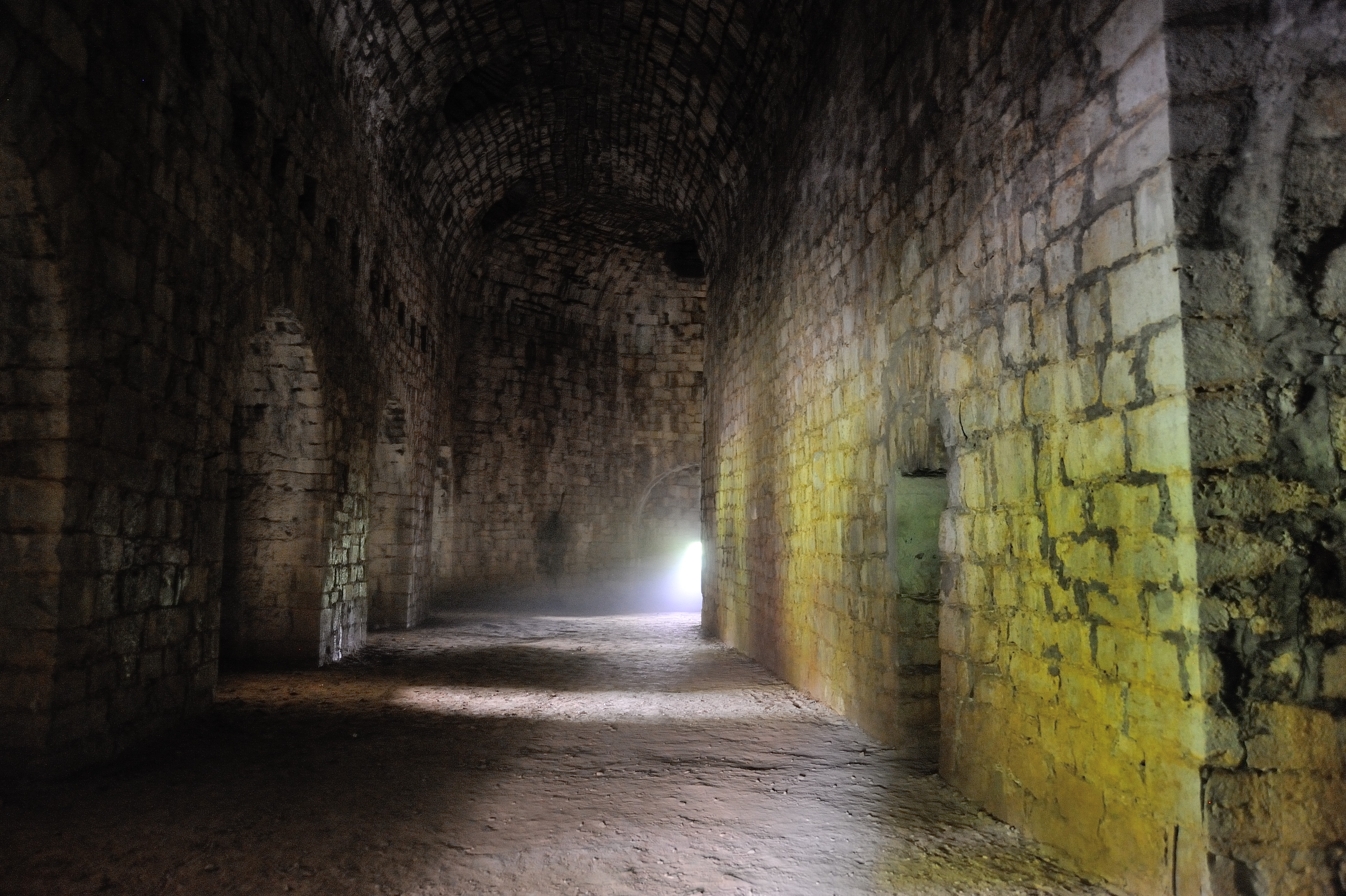 In den Gewölben der Festung Rothenberg. Aus den unteren Öffnungen wurde mit den Kanonen geschossen, ganz oben sind Öffnungen erkennbar, die als Rauchabzug dienten. Wie man an den Löchern auf halber Höhe noch erkennen kann, war auch noch ein Zwischenboden eingezogen.This is a photograph of an architectural monument.